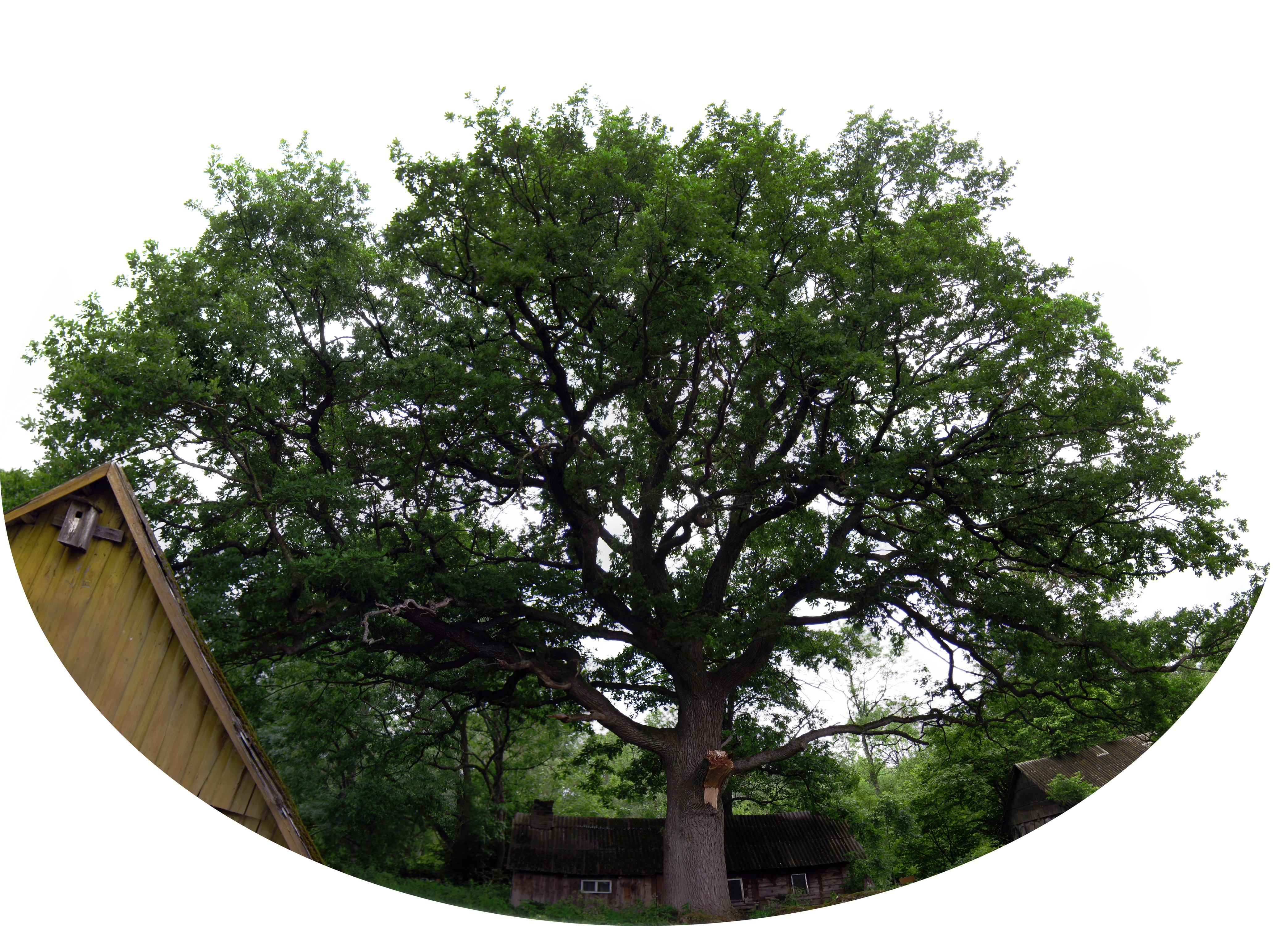 Lemsi küla tamm; Koksi talu tamm.